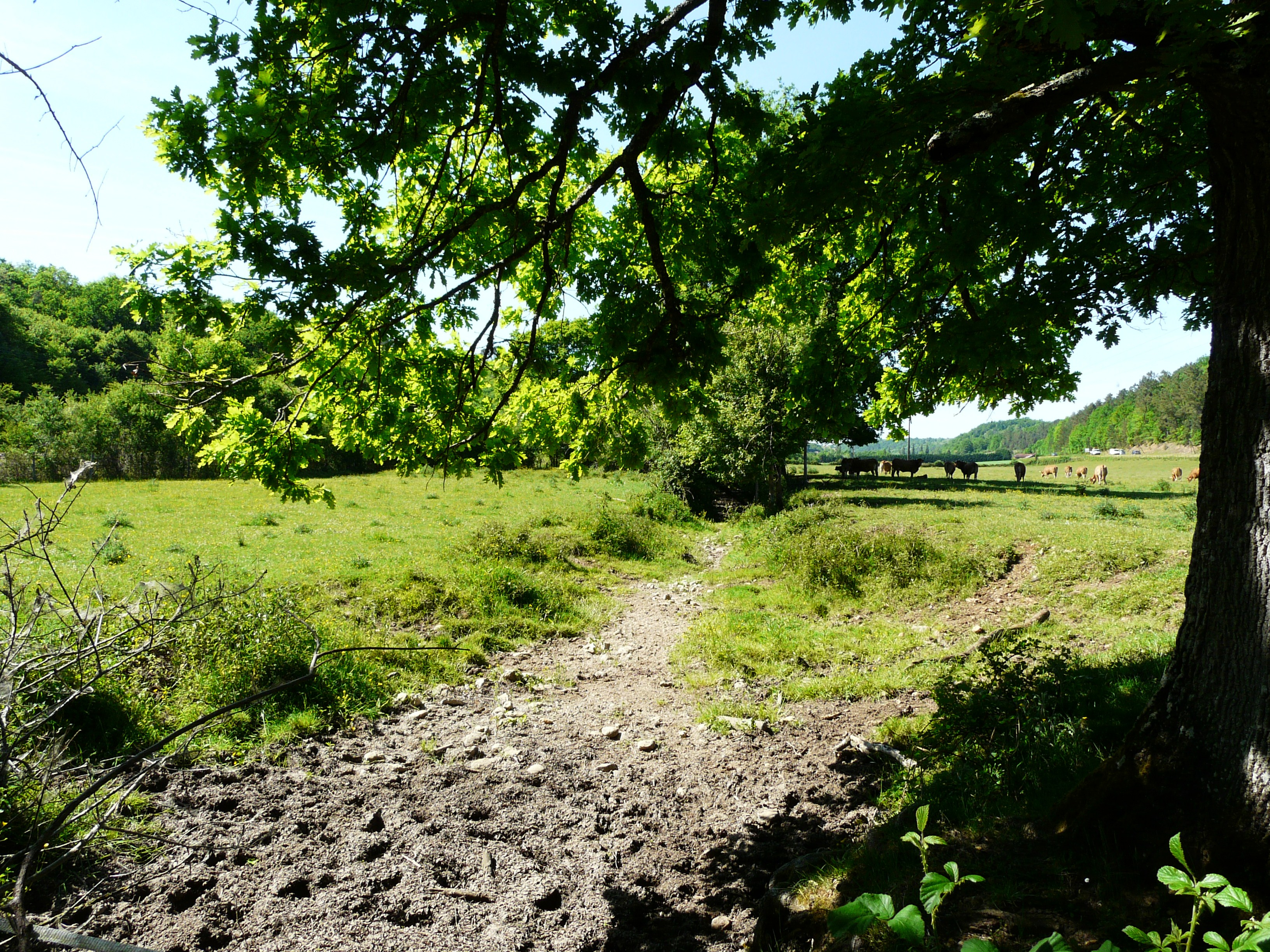 Près des Taupinies, le lit à sec du ruisseau de Saint-Geyrac marque la limite entre La Douze (à gauche) et Saint-Pierre-de-Chignac (à droite), Dordogne, France. Vue prise en direction de l'aval.